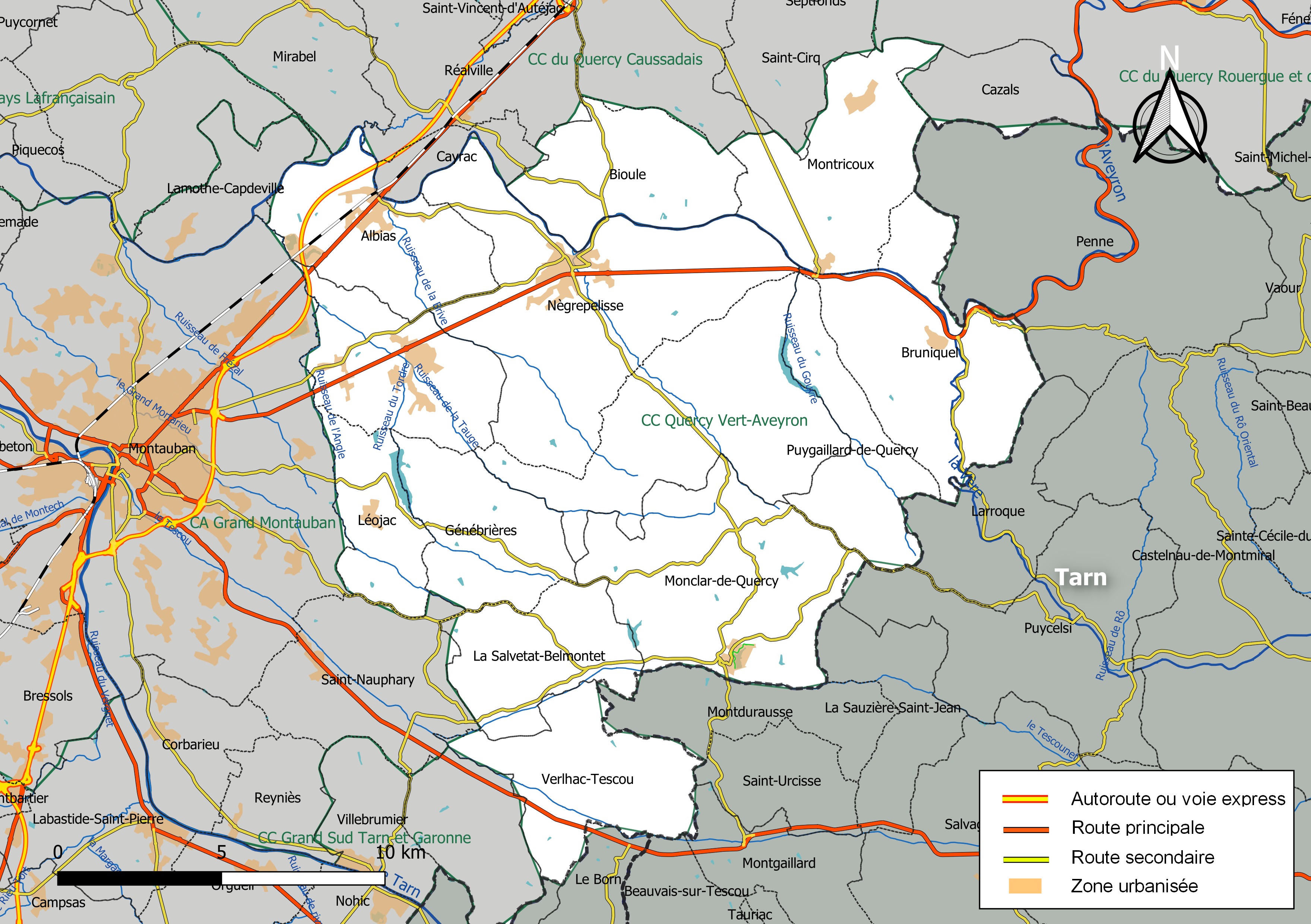 Carte géographique de la Communauté de communes Quercy Vert-Aveyron, département de Tarn-et-Garonne, France. Composition au 1er janvier 2019.